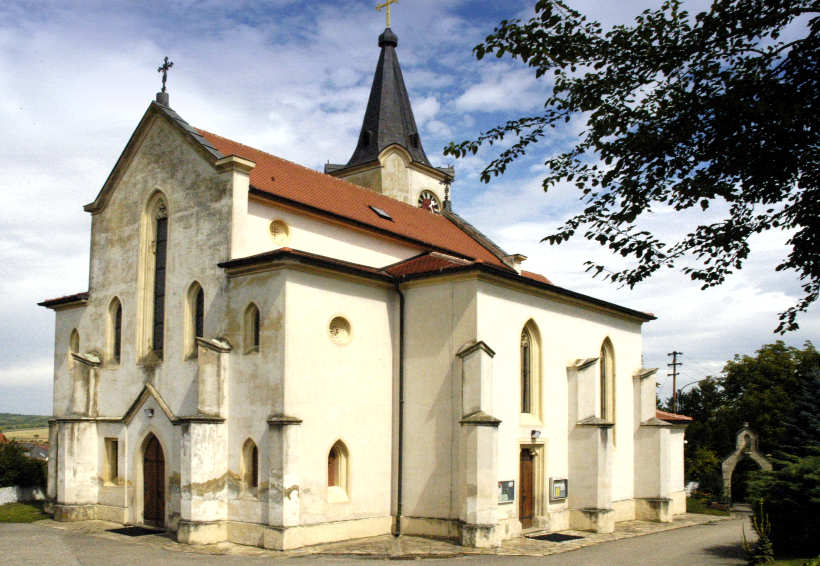 Filialkirche heilige Philipp und Jakob in Glaubendorf, Gemeinde Heldenberg